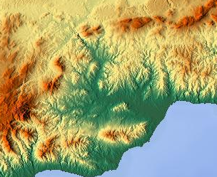 Mapa topográfico del Valle del Guadalhorce